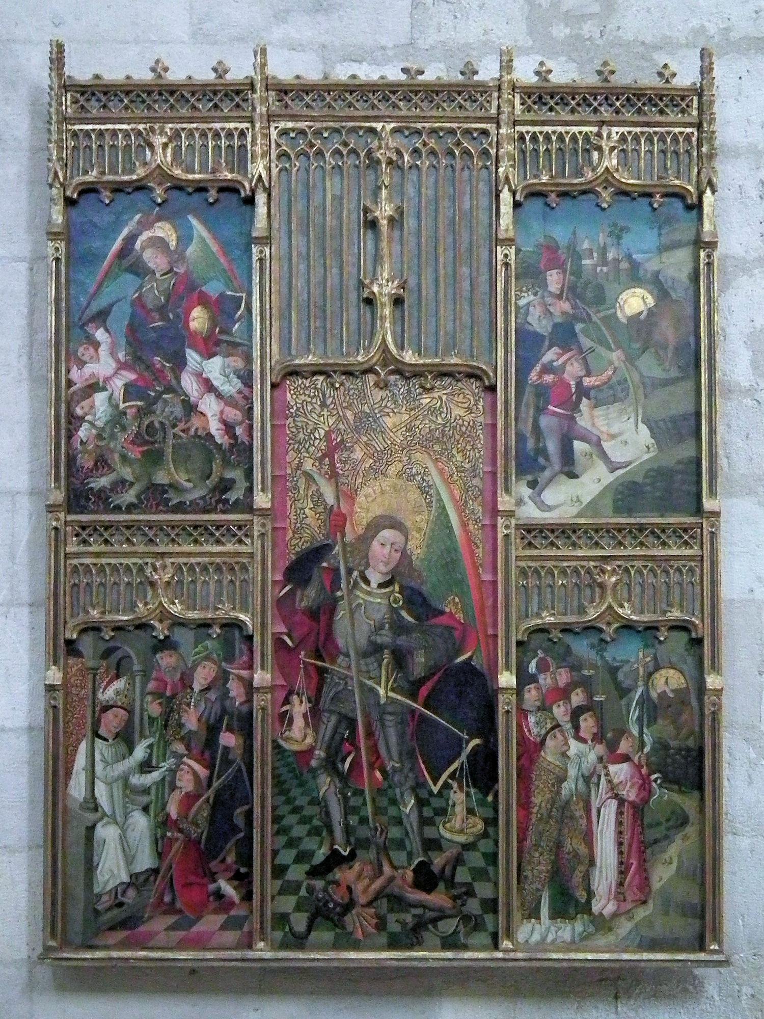 Retable of Saint Michael, Museo Diocesano y Catedralicio, Valladolid, Castile and León, Spain